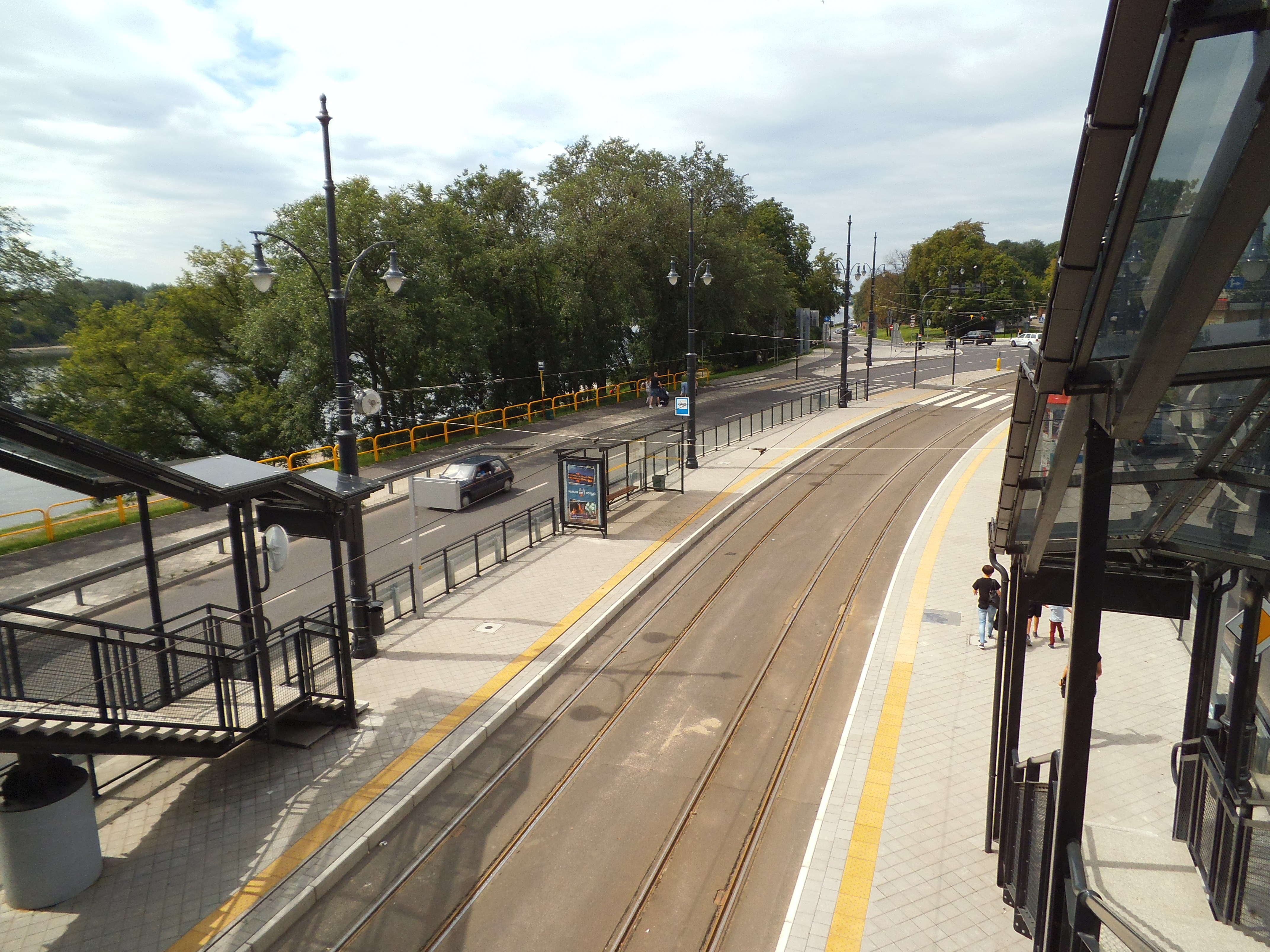 Węzeł przesiadkowy przy dworcu Toruń Miasto